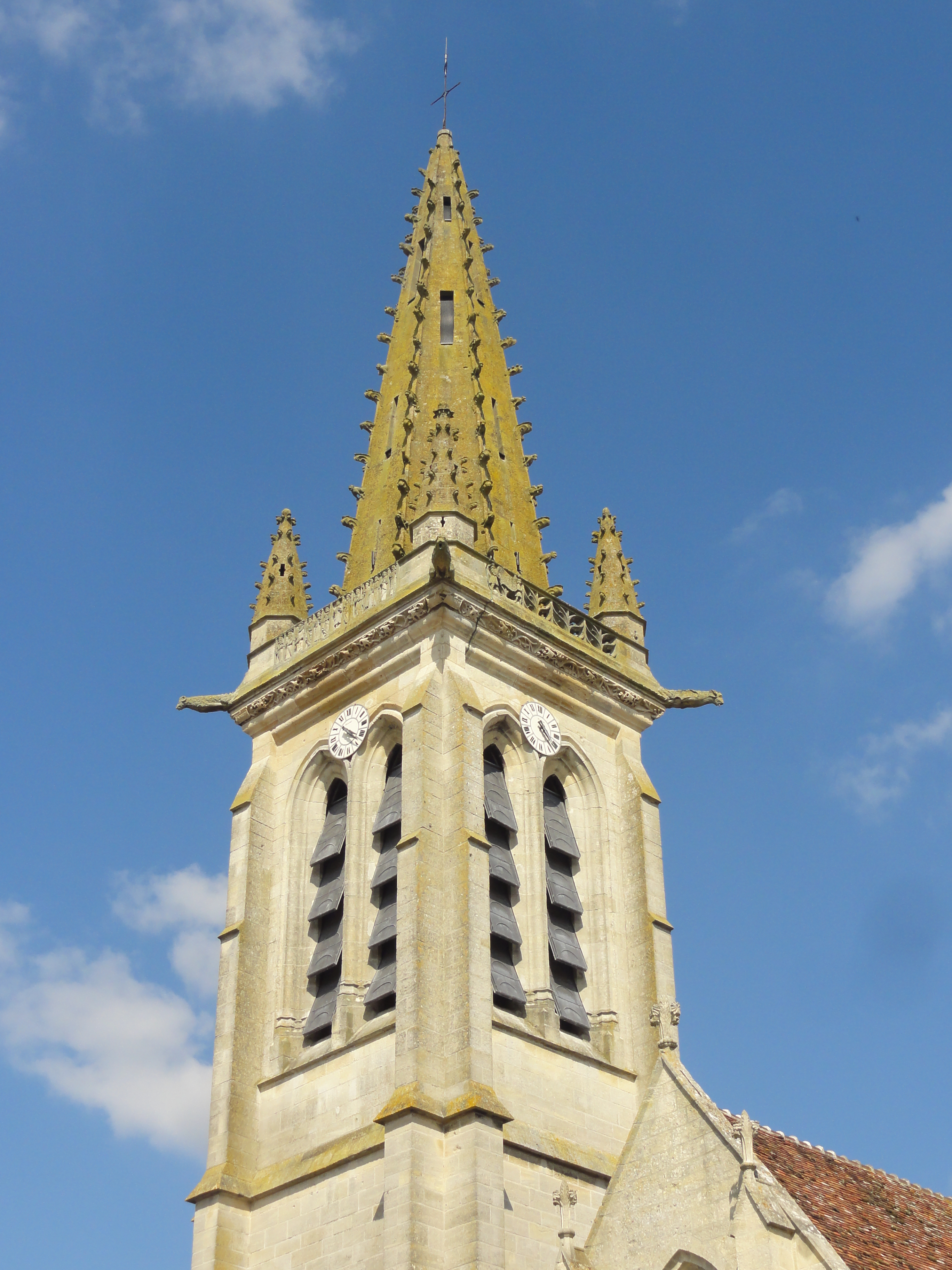 Clocher, étage de beffroi et flèche.